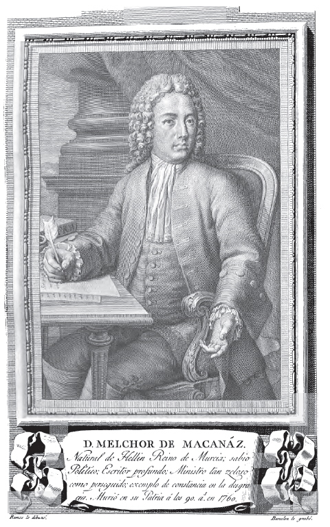 Retrato de Melchor de Macanáz.